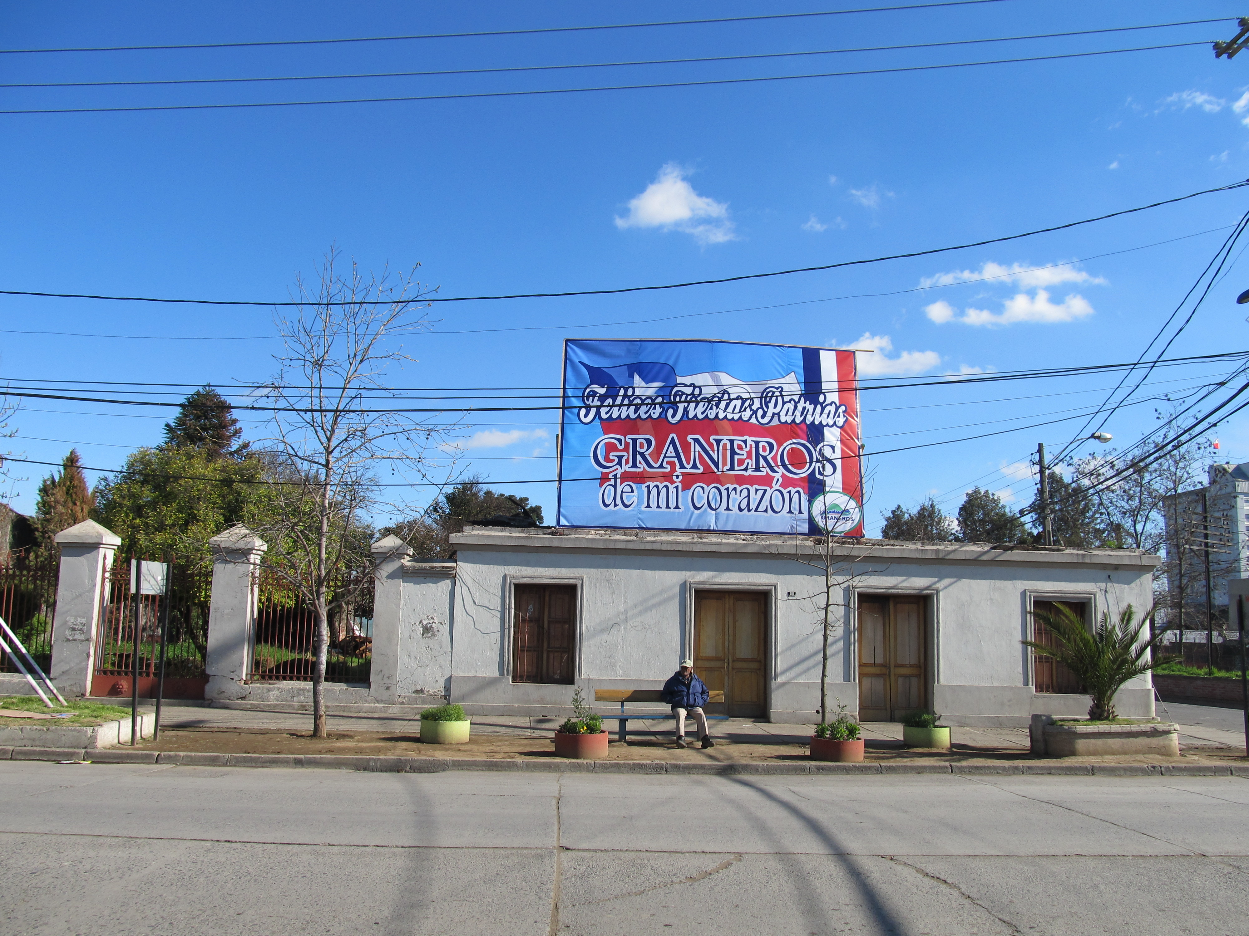 Casa Hodgkinson de Graneros This is a photo of a national monument in Chile: 360